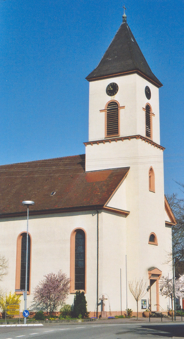 Ichenheims Kirche im Weinbrenner-Stil. Sankt Nikolaus wurde 1819-1822 erbaut nach Entwurf von Weinbrenner-Schüler Hans Voss. Der Kirchenbau zählt zu den am stärksten der formalen Reduktion verpflichteten Entwürfen im badischen Klassizismus.